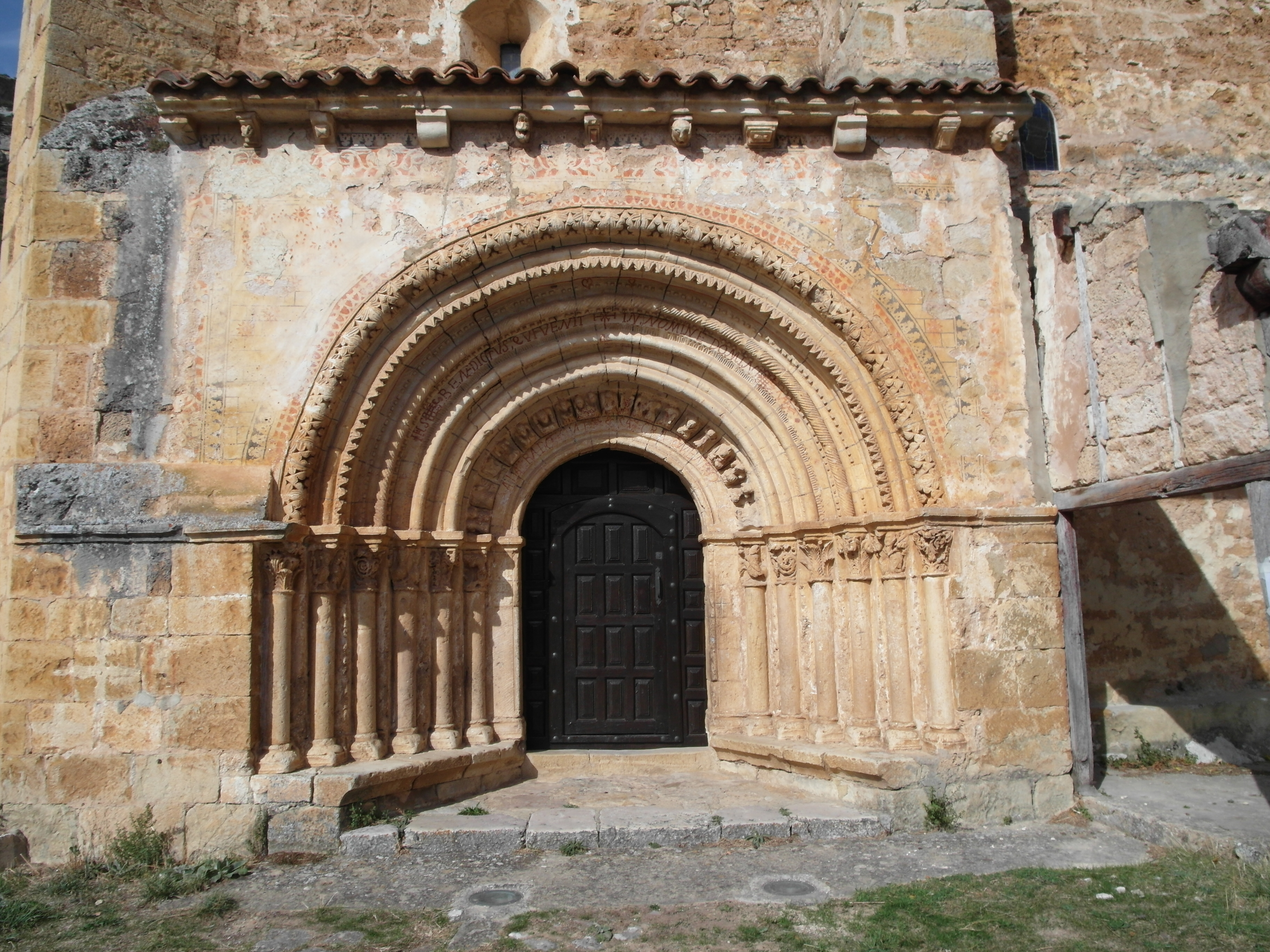 Escalada, Burgos.